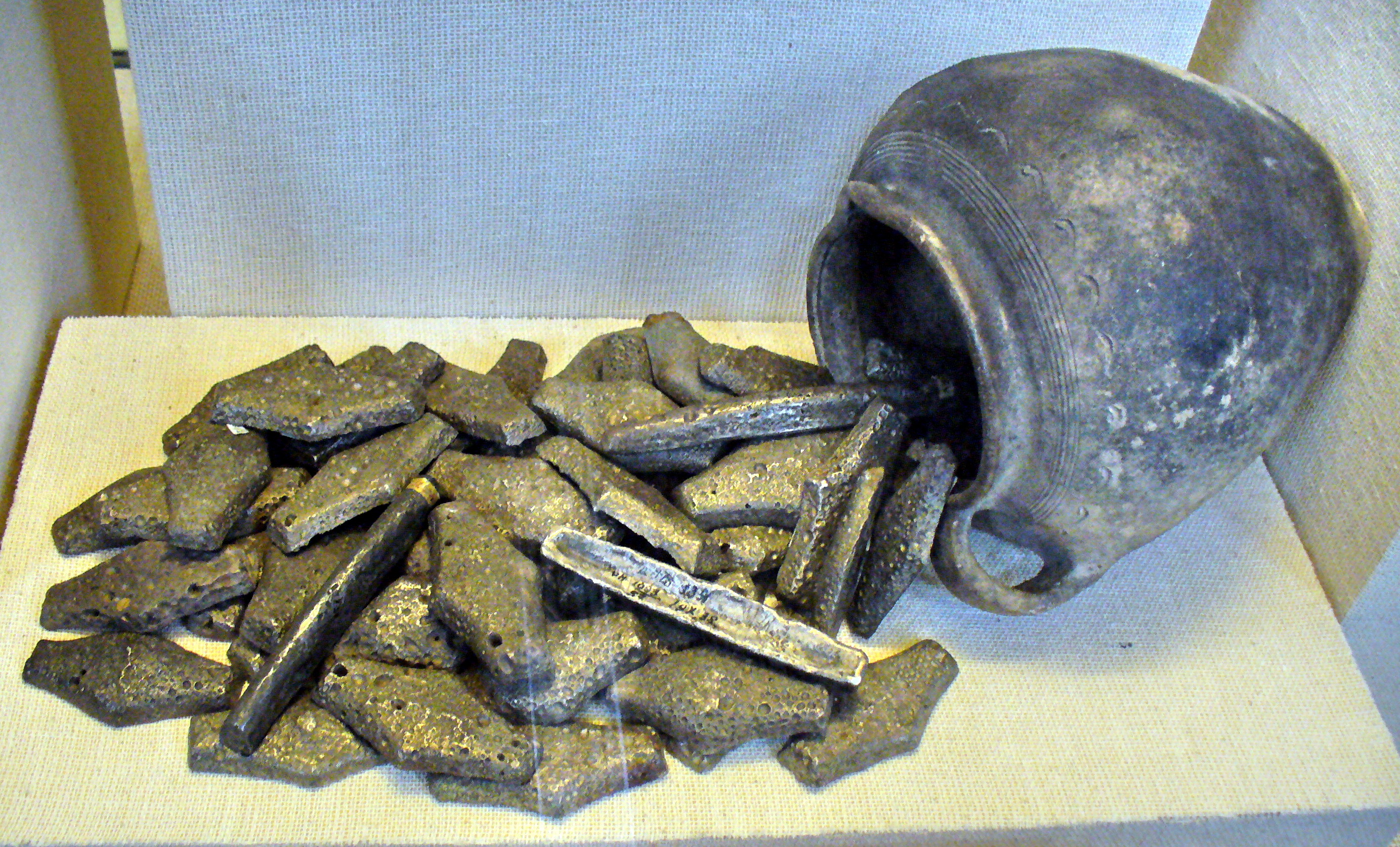 Клад - 56 гривен. Киев. XII - п.п. XIII века. Серебро, литьё, ковка.